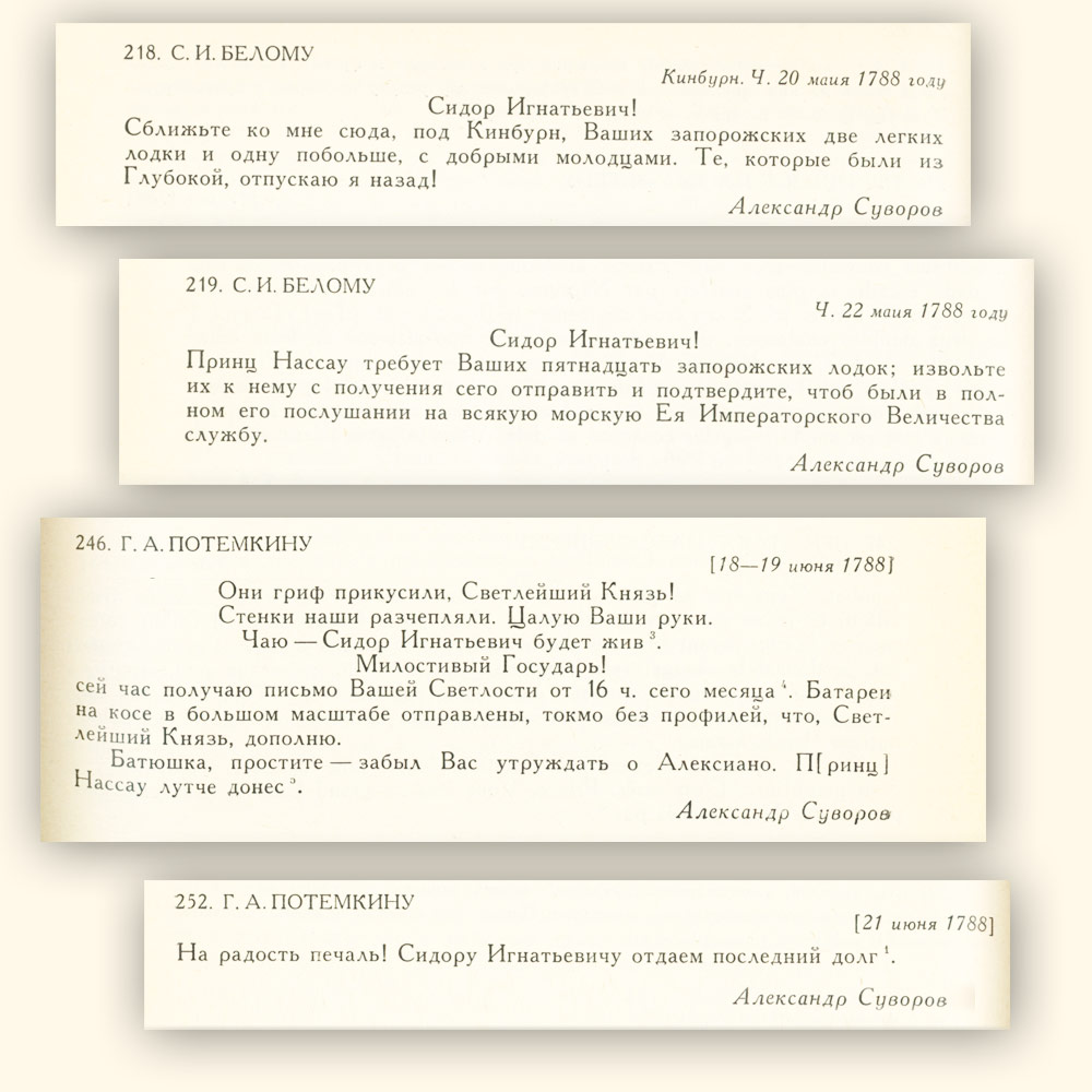 Из писем Александра Суворова